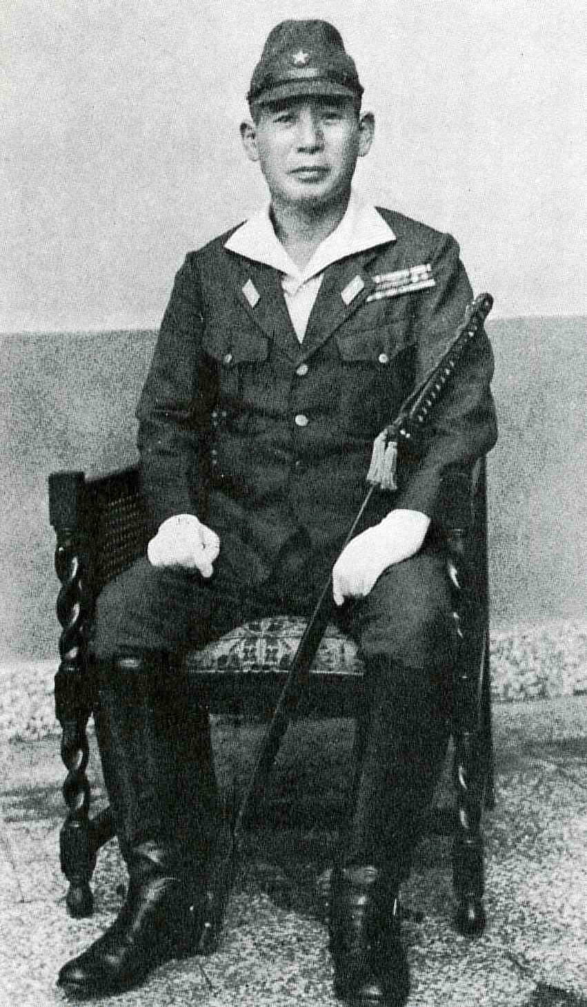 土橋勇逸中将。